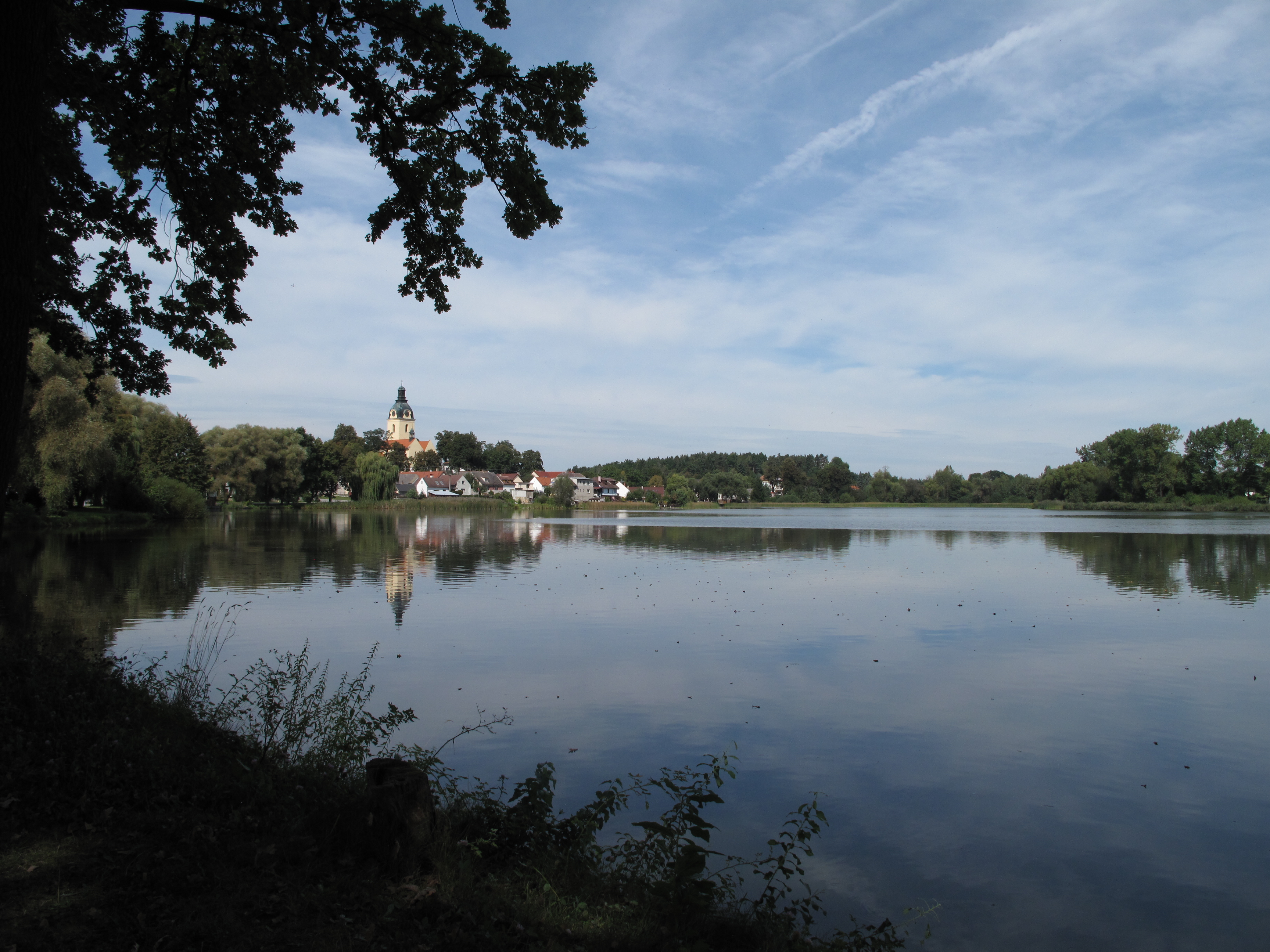 Podkostelní rybník. Okres Písek, Česká republika.